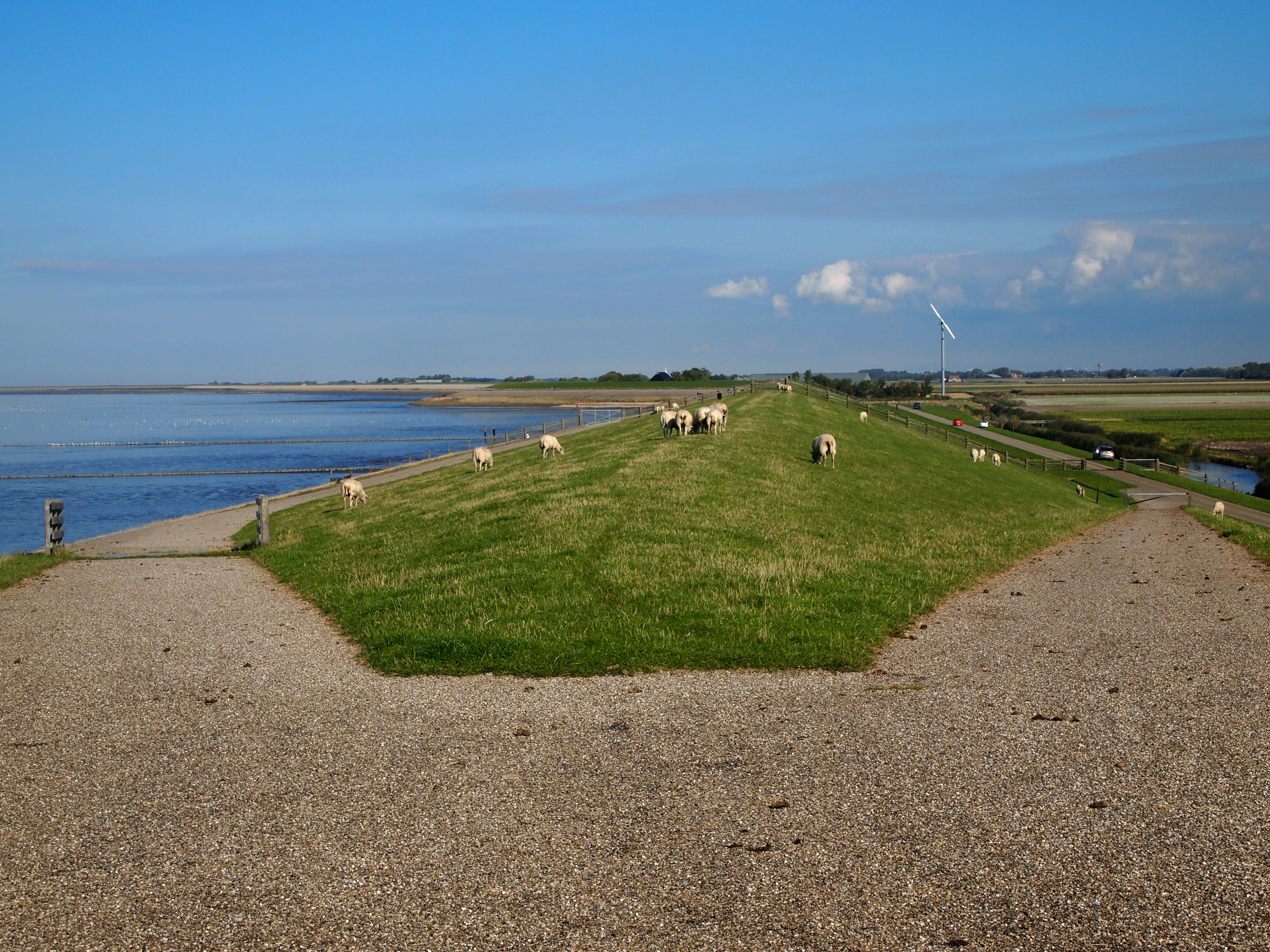 Op de dijk. De Westhoek (Friesland).